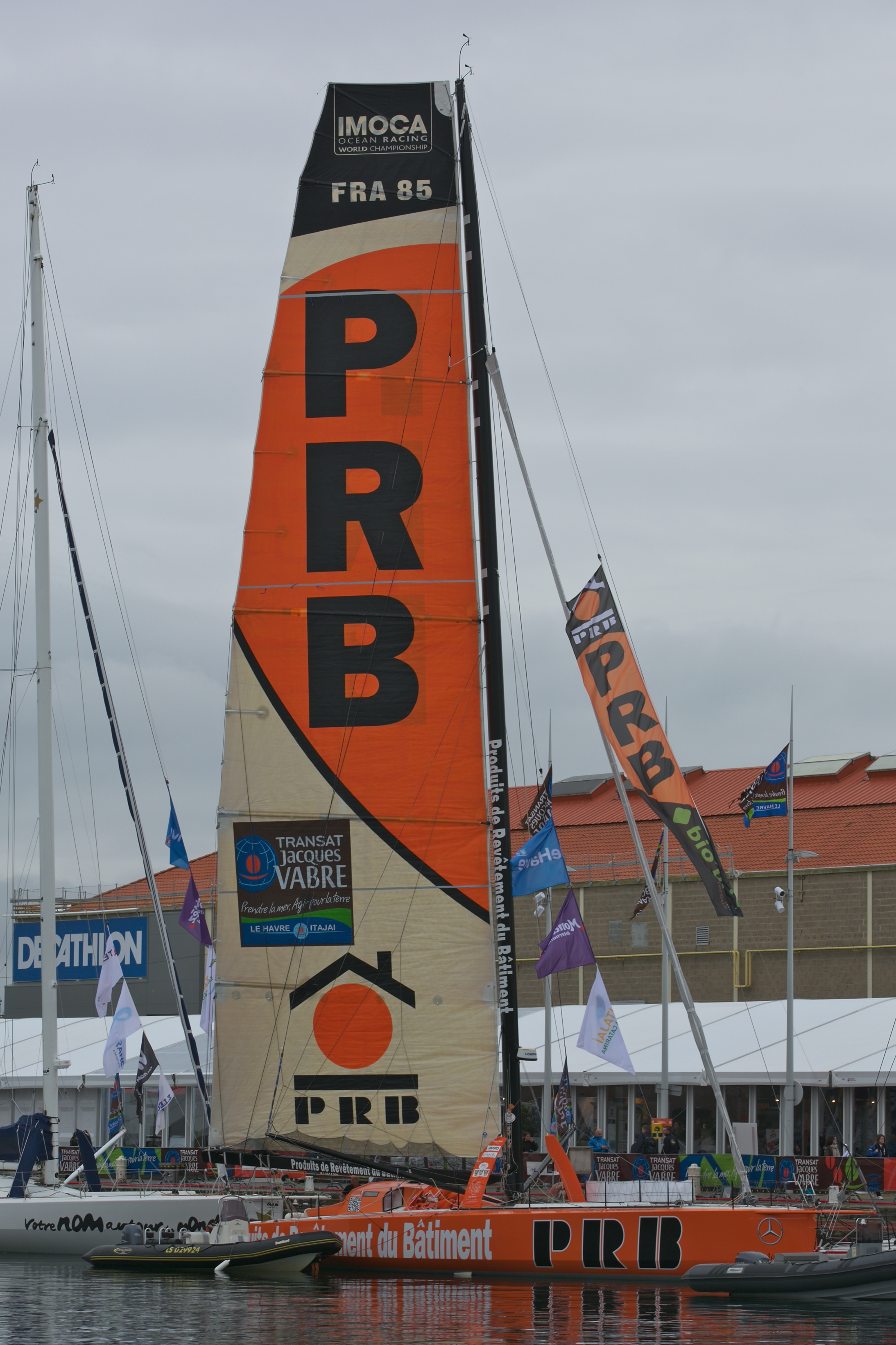 PRB 5 au départ de la Transat Jacques Vabre 2013.